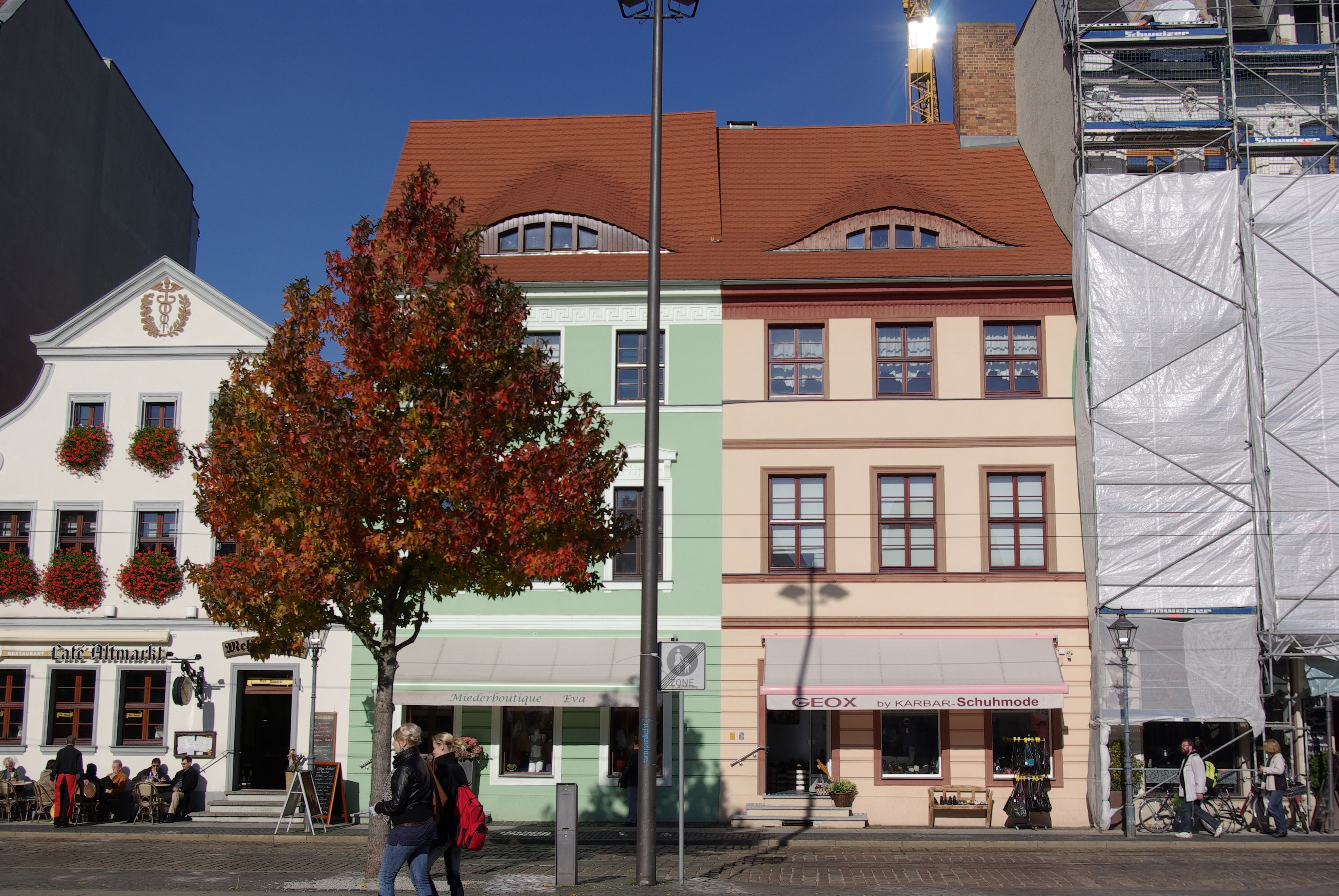 Cottbus in Brandenburg. Das Haus Altmarkt 11 und Altmark 12 stehen jeweils unter Denkmalschutz.